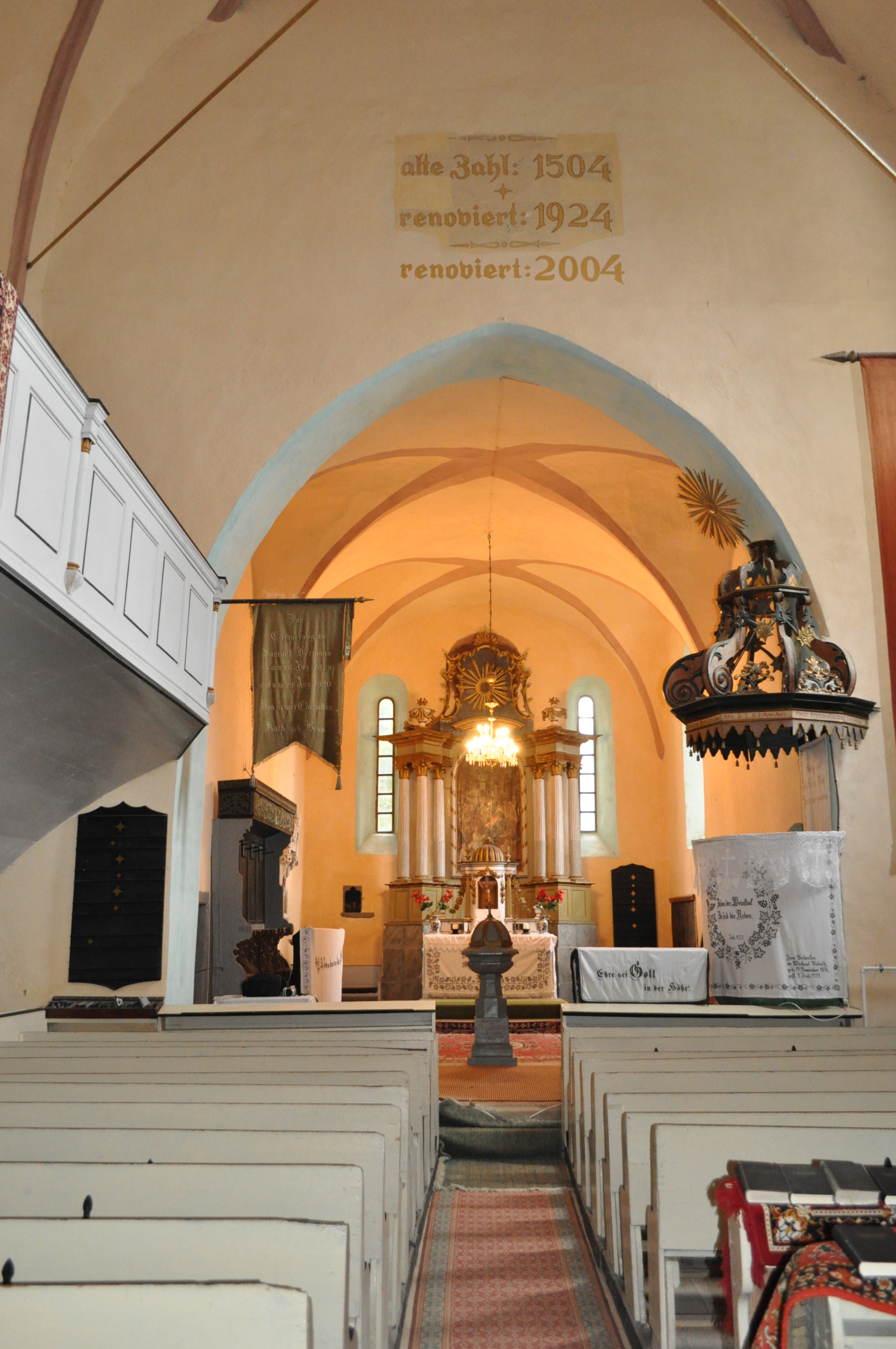 Biserica evanghelică fortificată, sat BAZNA; comuna BAZNA, județul Sibiu 01